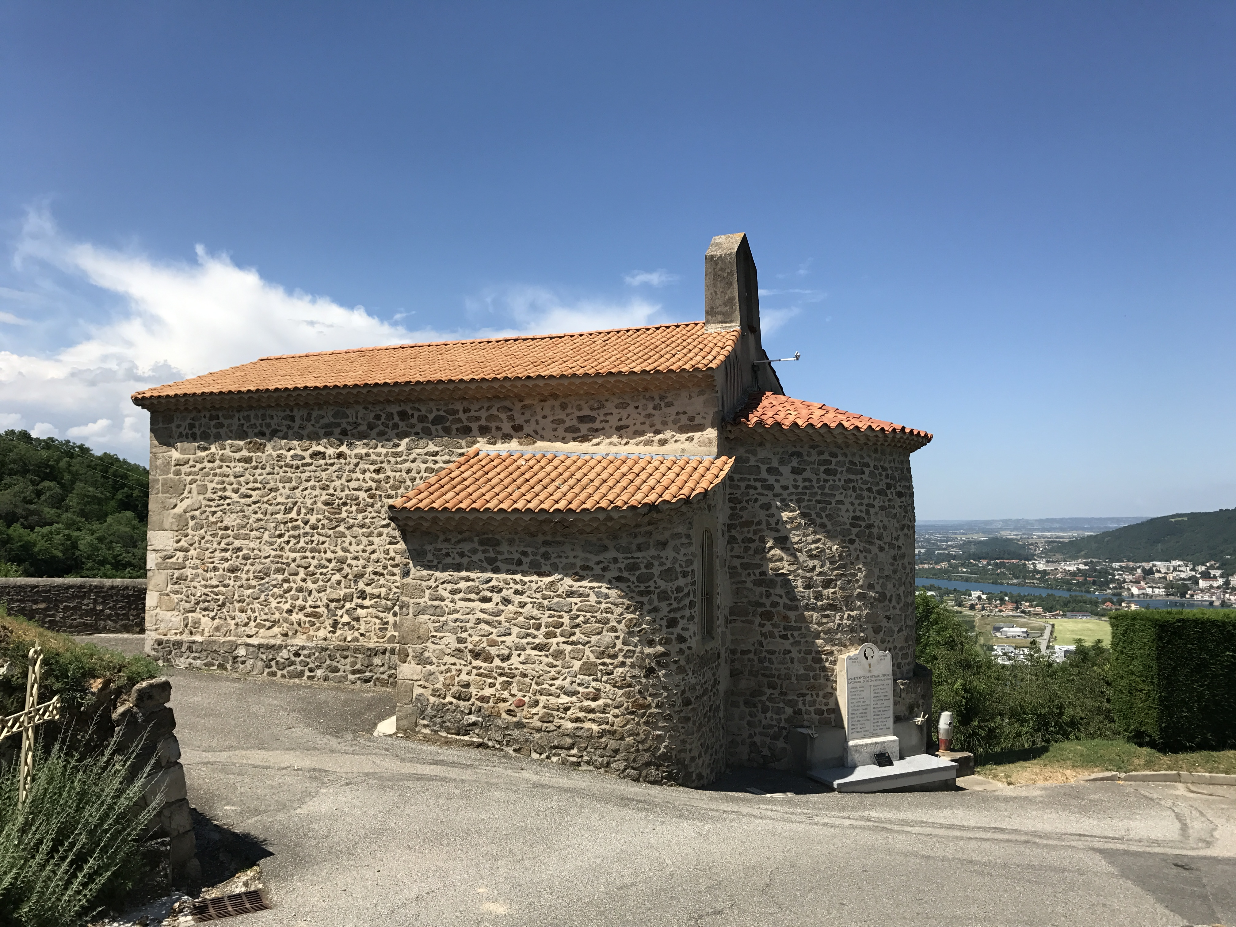 Ozon (Ardèche) en juin 2017.